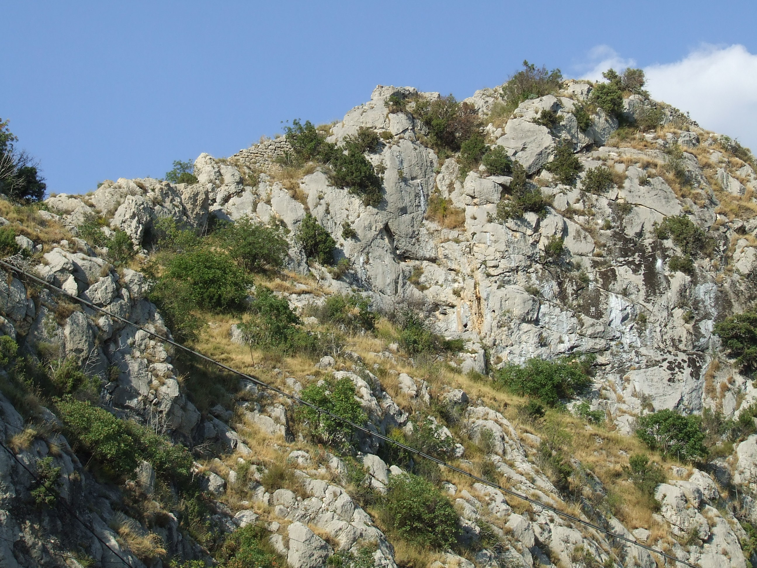 Restes del Castell d'Abella, al capdamunt del poble.